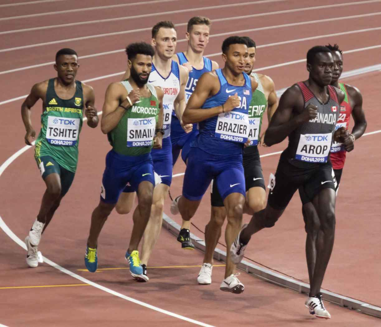 DOH30106 800m men semifinal